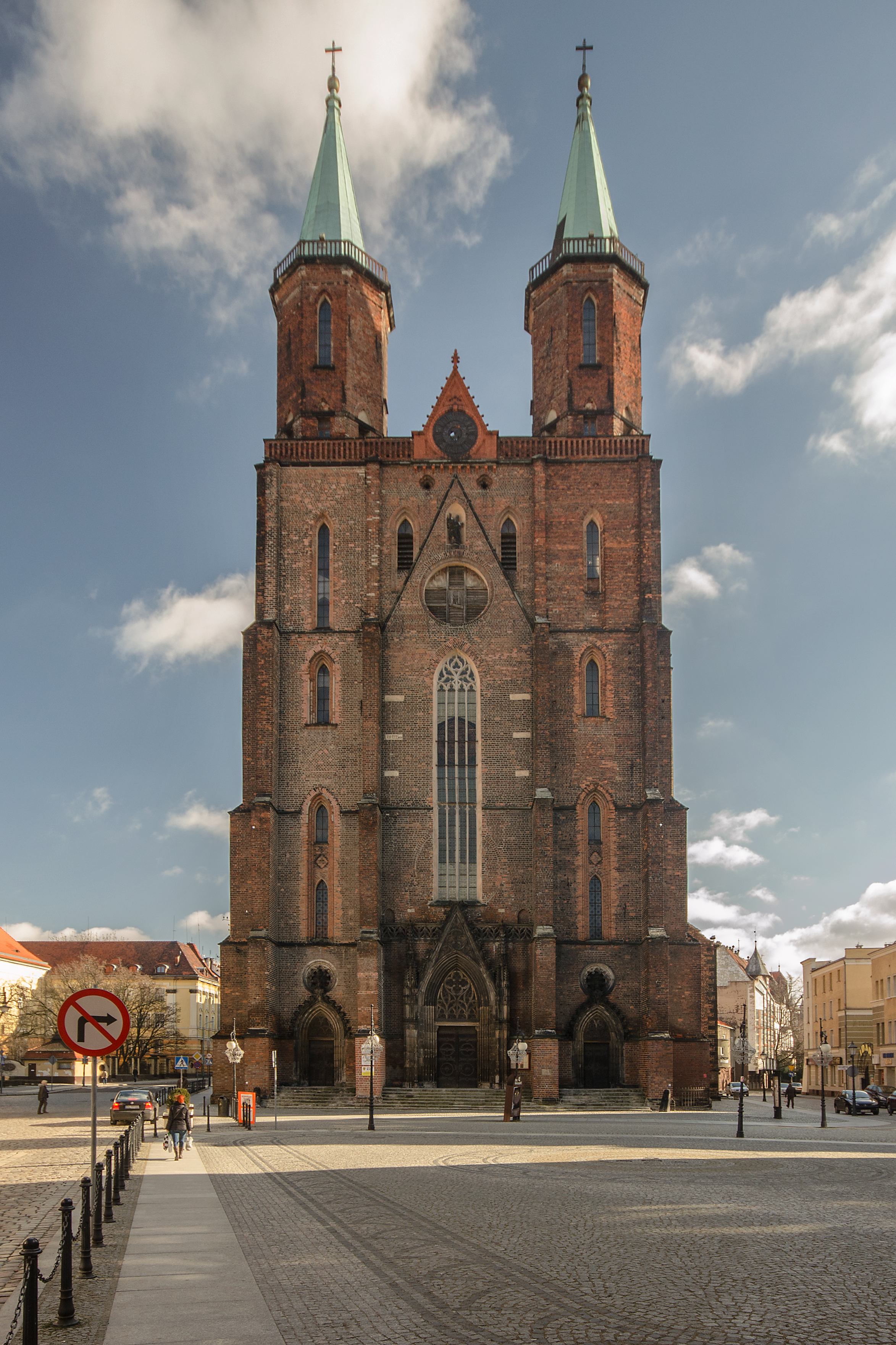 Legnica, kościół p.w. Najśw. Marii Panny, ob. ewangelicki, kon. XII, 1340-1386, XV, XX